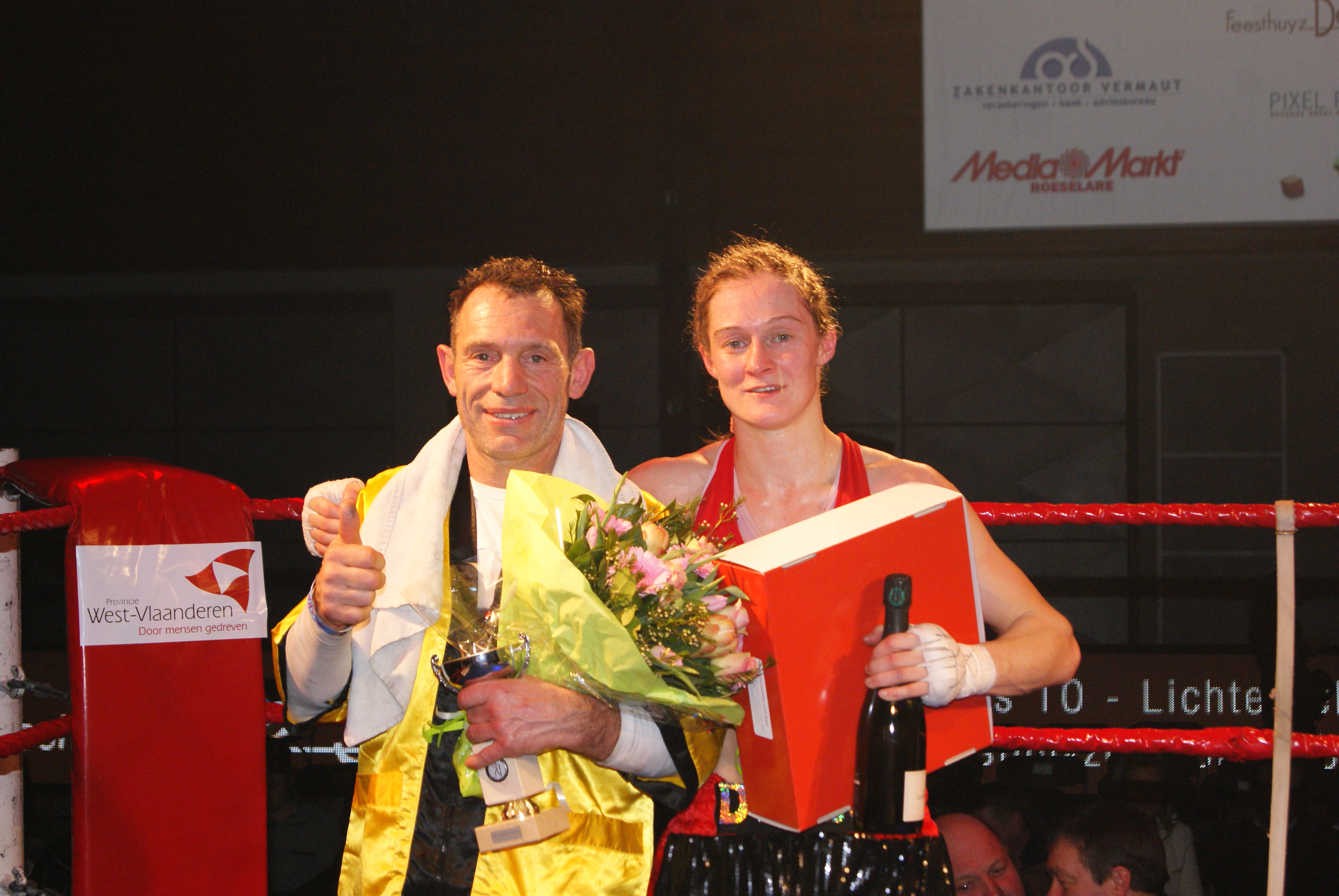 Delfine Persoon en Filiep Tampere. Genomen op het boksgala te Roeselare.